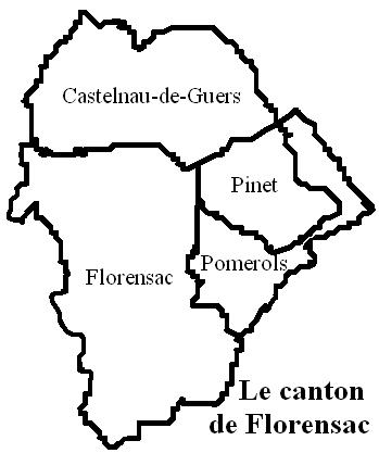 Le canton de Florensac Image personnelle